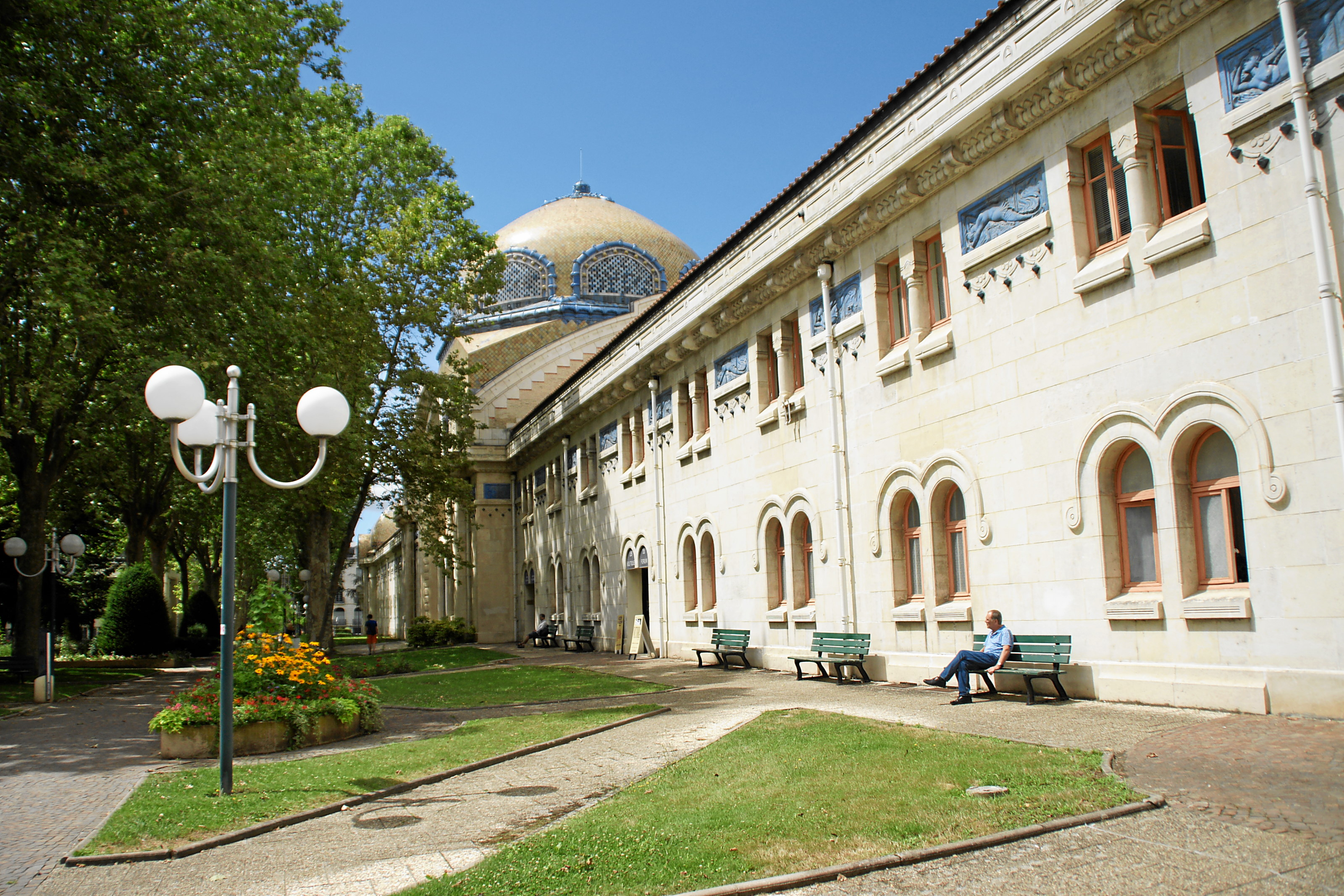 Vichy: Centre thermal des Dômes